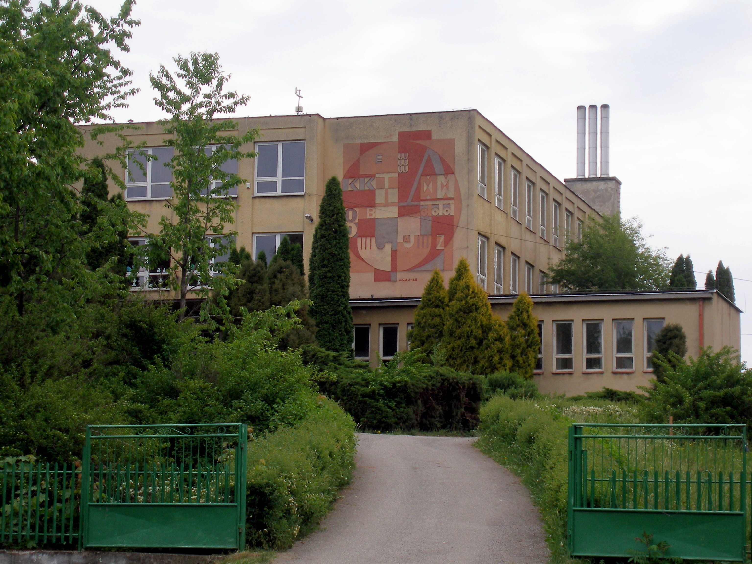 Obec Krivany okres Sabinov